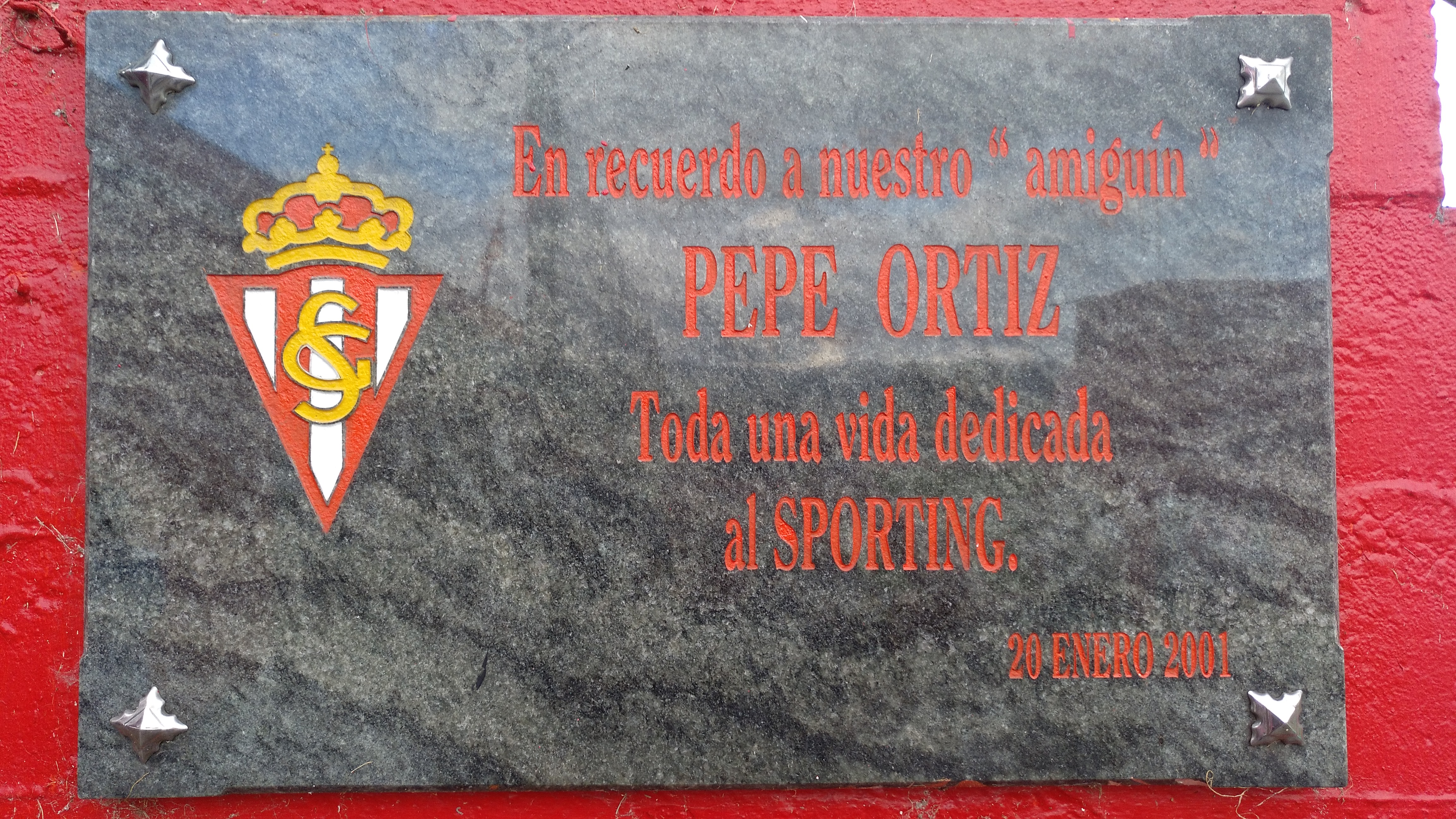 Placa en recuerdo de Pepe Ortiz, exfutbolista del Real Sporting de Gijón, en la Escuela de fútbol de Mareo.